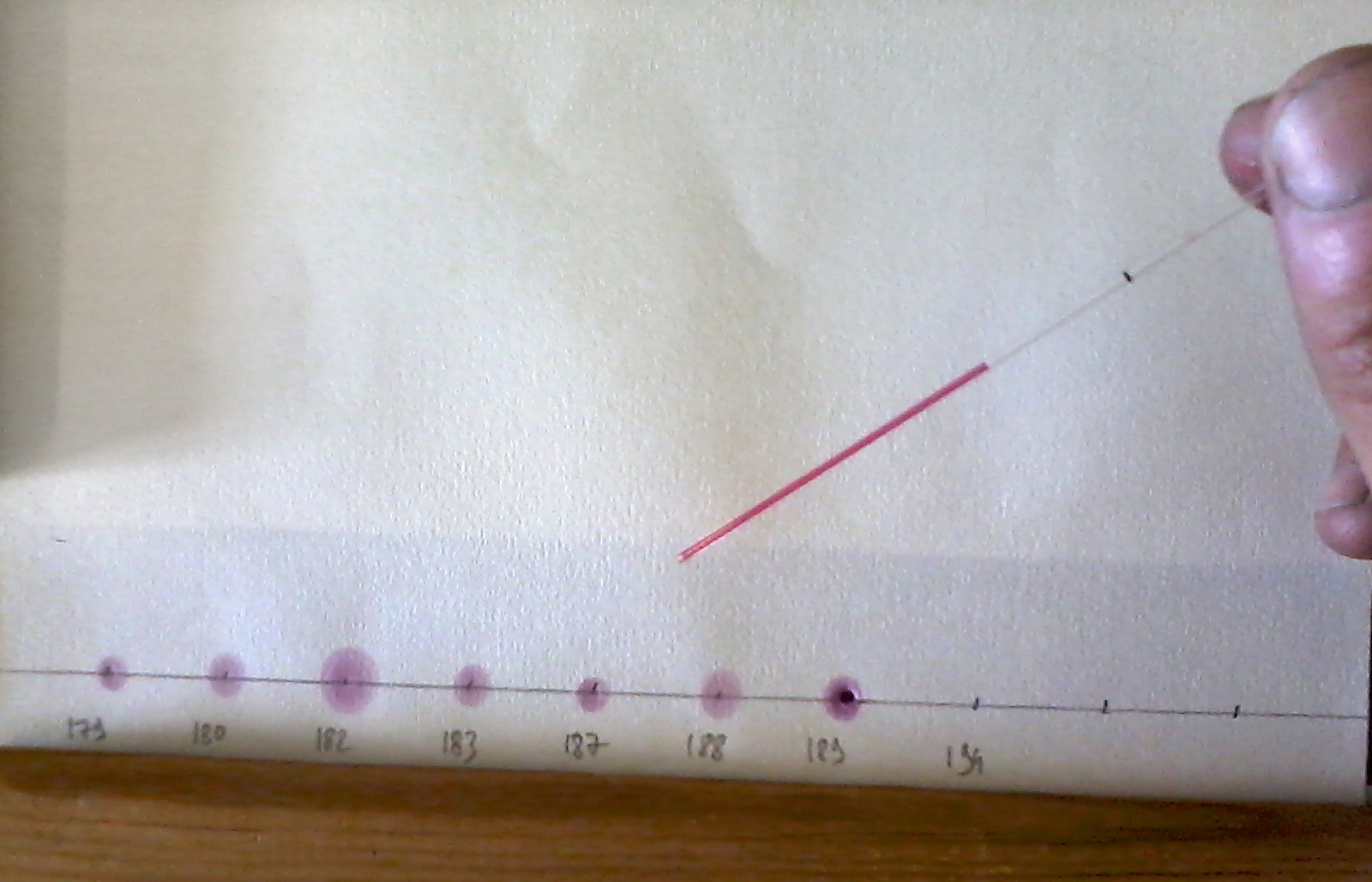 Dépôt de vin sur papier chromatographique à la micro-pipette